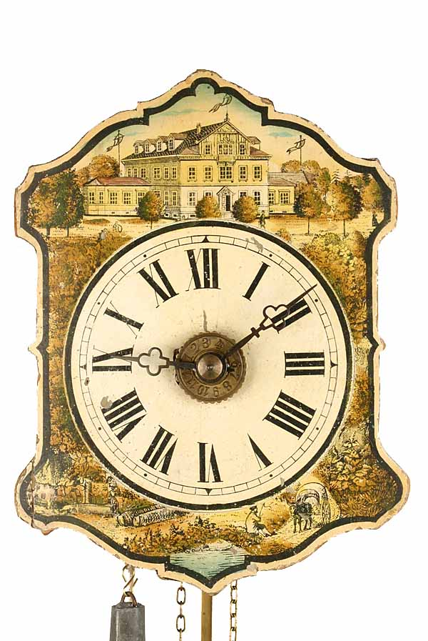 Wanduhr mit Abbildung der Furtwanger Gewerbehalle, dem ersten ständigen Ausstellungsgebäude der "Historischen Uhrensammlung" , um 1880 (Deutsches Uhrenmuseum, Inv. 2011-044)